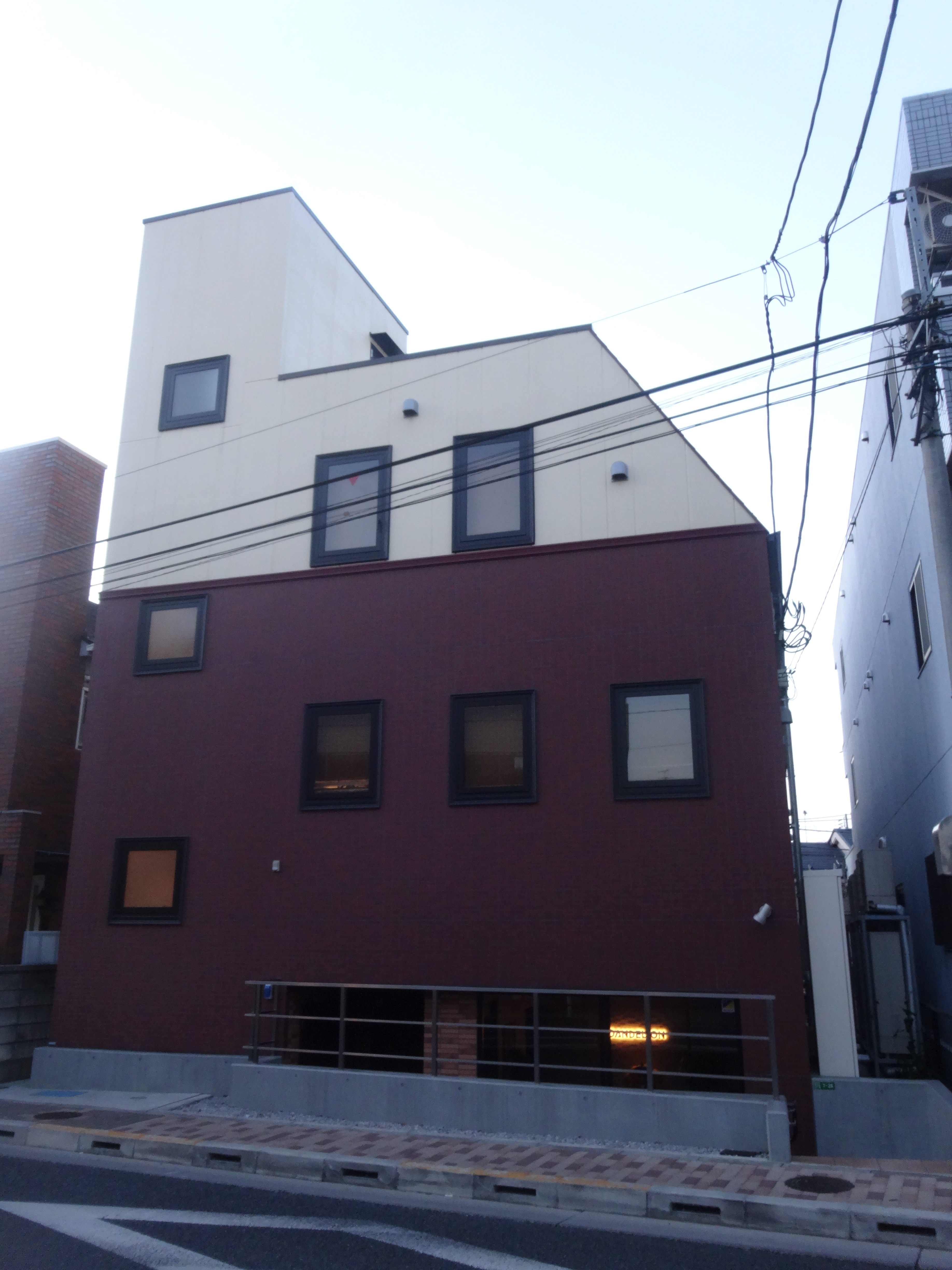 東京都練馬区東大泉に所在するビル・三慶第2ビル。アニメ制作会社のダンデライオンアニメーションスタジオが入居している。